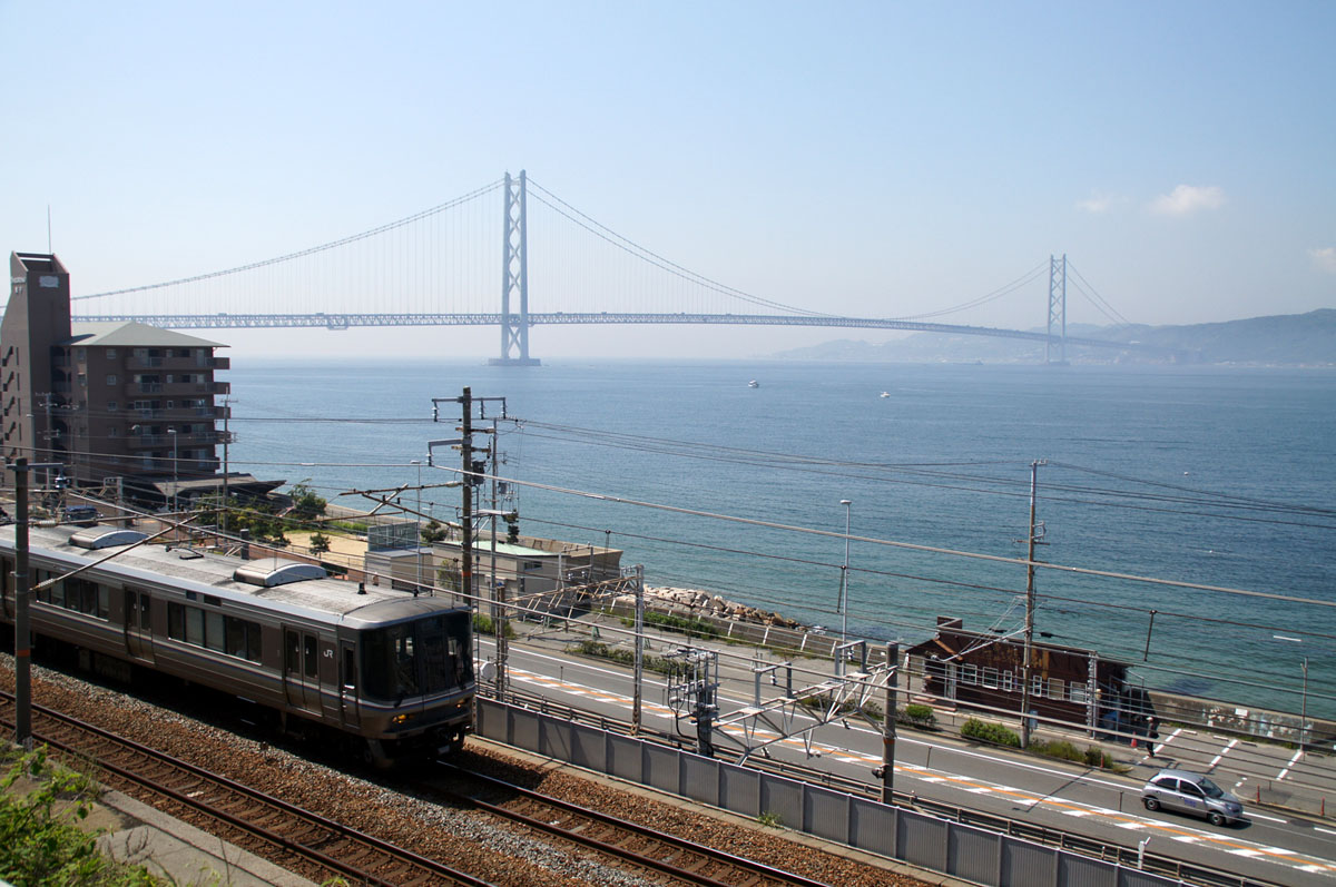 明石海峡大橋をバックに走る新快速